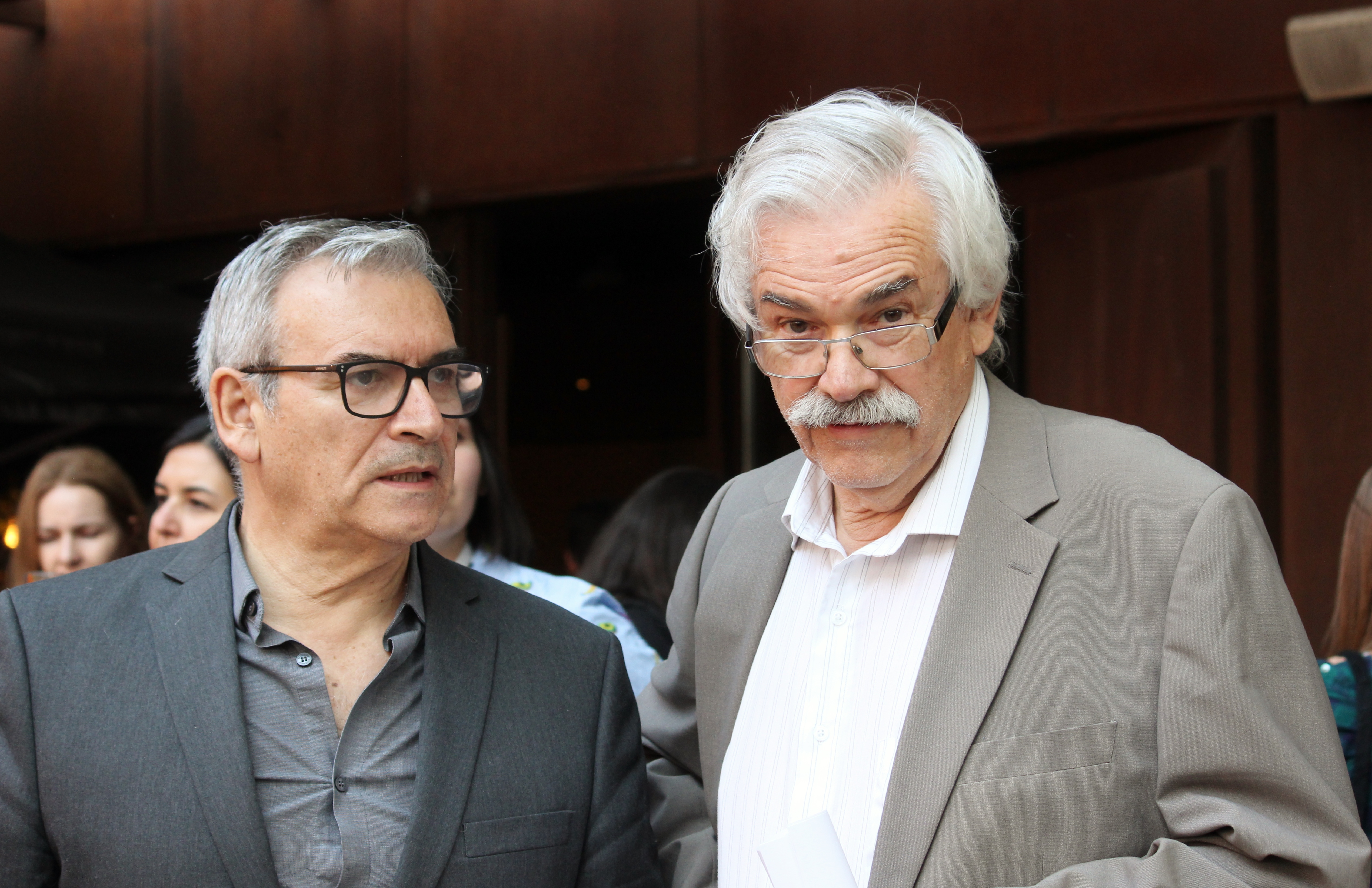 El editor chileno Arturo Infante y su hermano poeta Sergio durante la segunda etapa del Festival de Autores de Santiago 2018 realizada en el GAM.